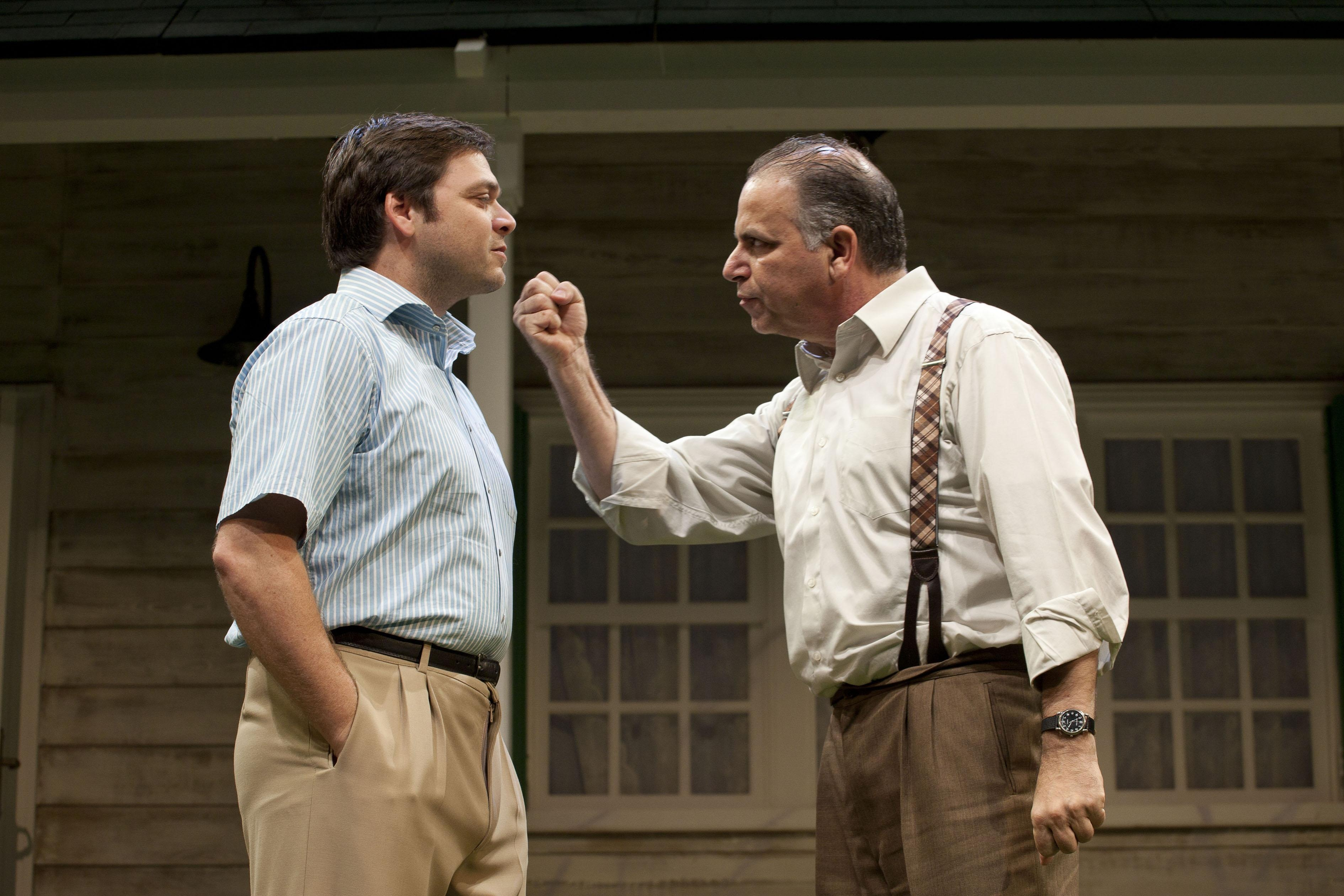 נתן דטנר ואוהד קנולר, בהצגה "כולם היו בניי" מאת ארתור מילר, בבימויו של משה נאור, קופרודוקציה של תיאטראות הקאמרי וחיפה, 2011